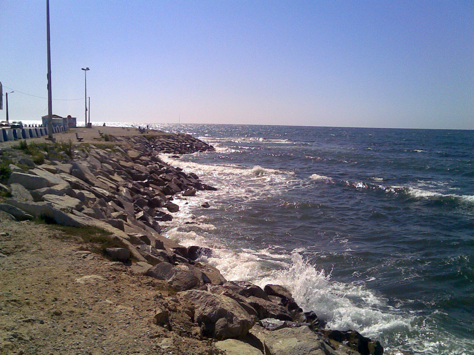 La corniche de Beni Khiar